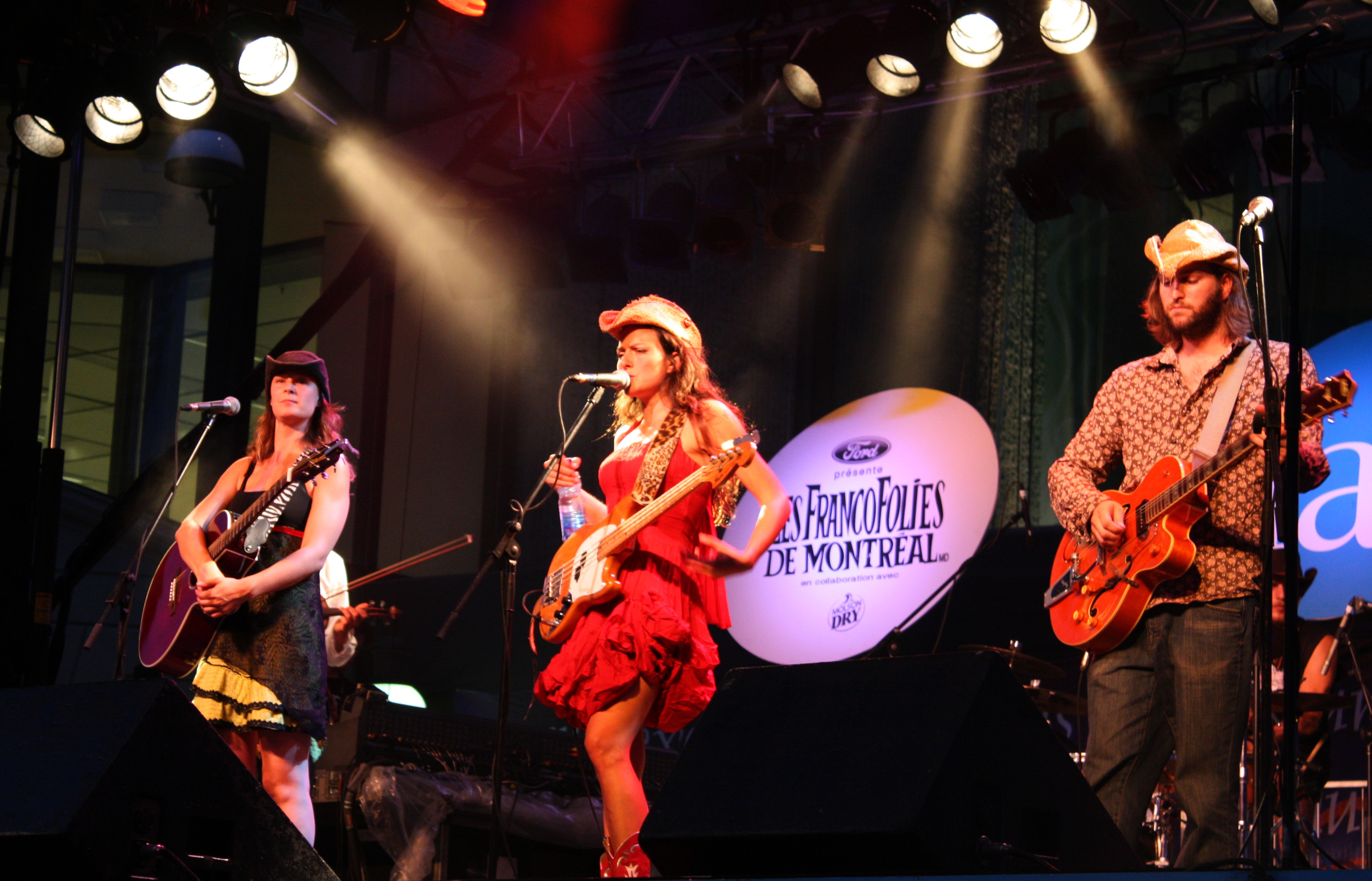 Madame Moustache aux FrancoFolies de Montréal en juillet 2008. De gauche à droite: Julie Ross, Geneviève Néron et Mathieu Vigneault.